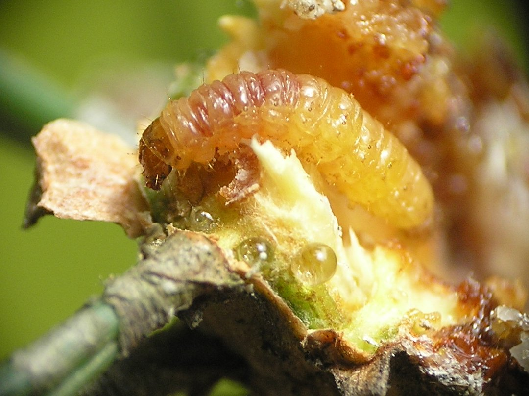 Retinia resinella (syn. Petrova resinella, Petrova rexinella), Zwójka żywiczanaczka - larwa.